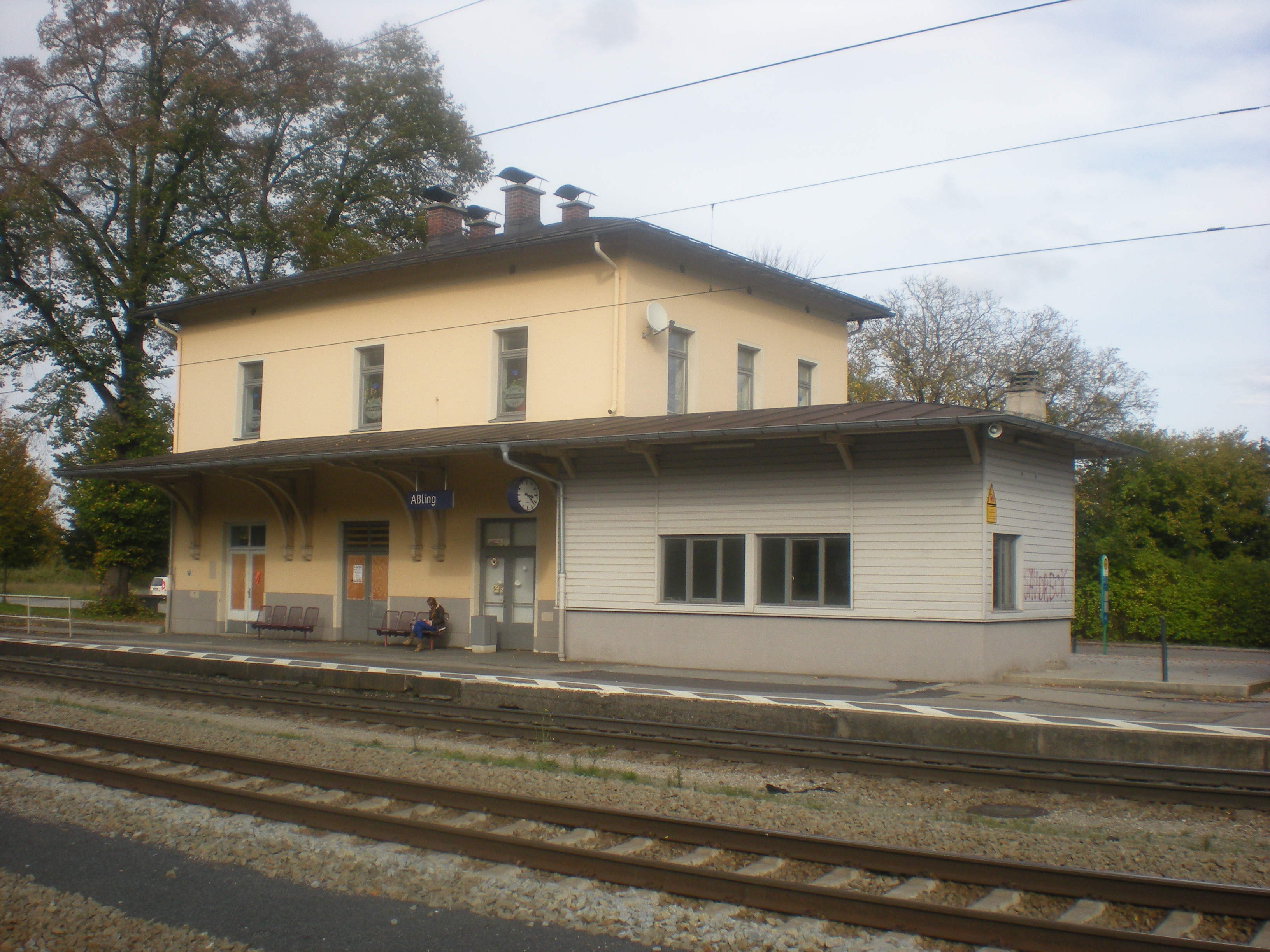 Empfangsgebäude des Bahnhofs Aßling (Oberbay) von der Gleisseite